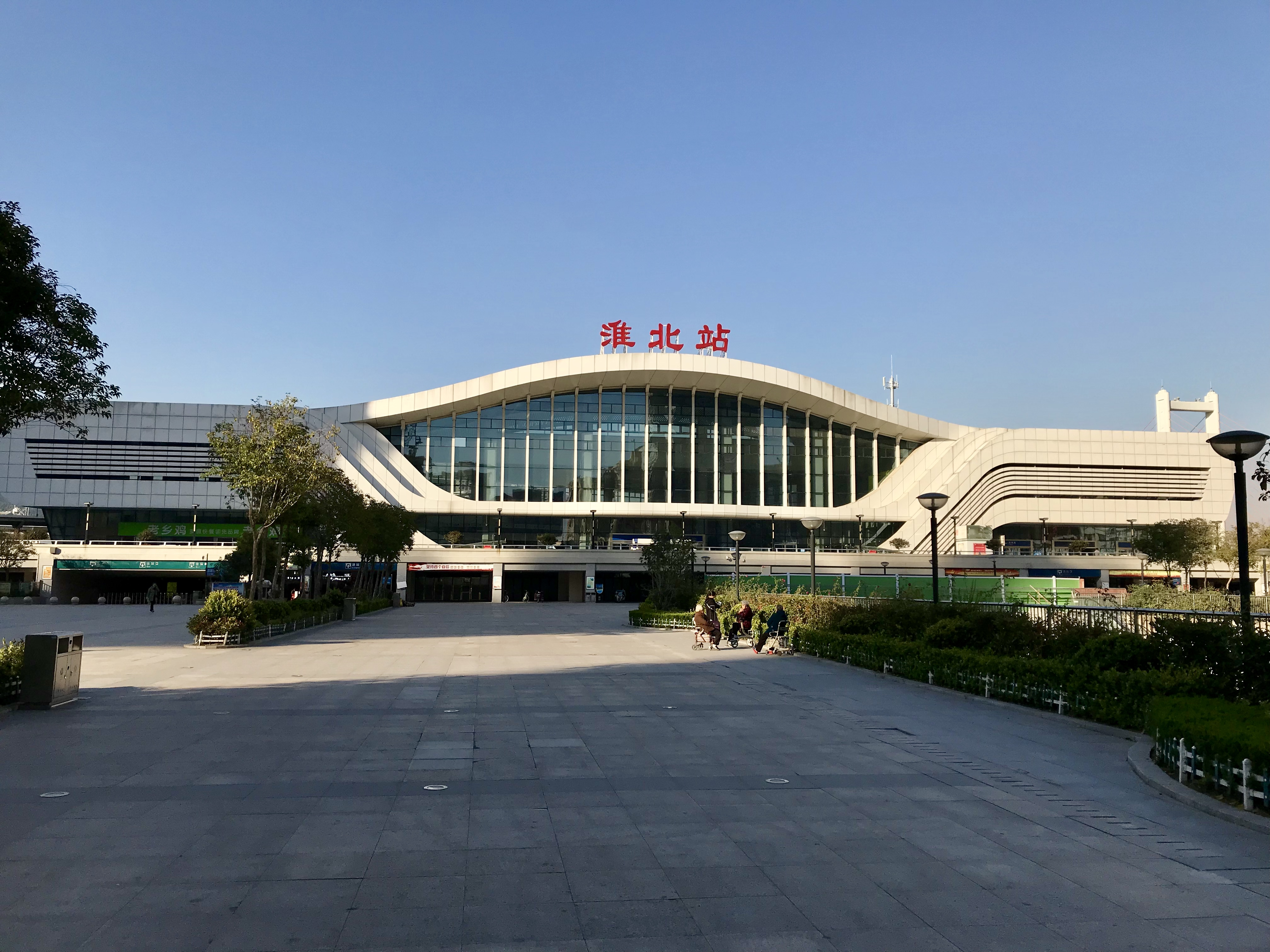 淮北站